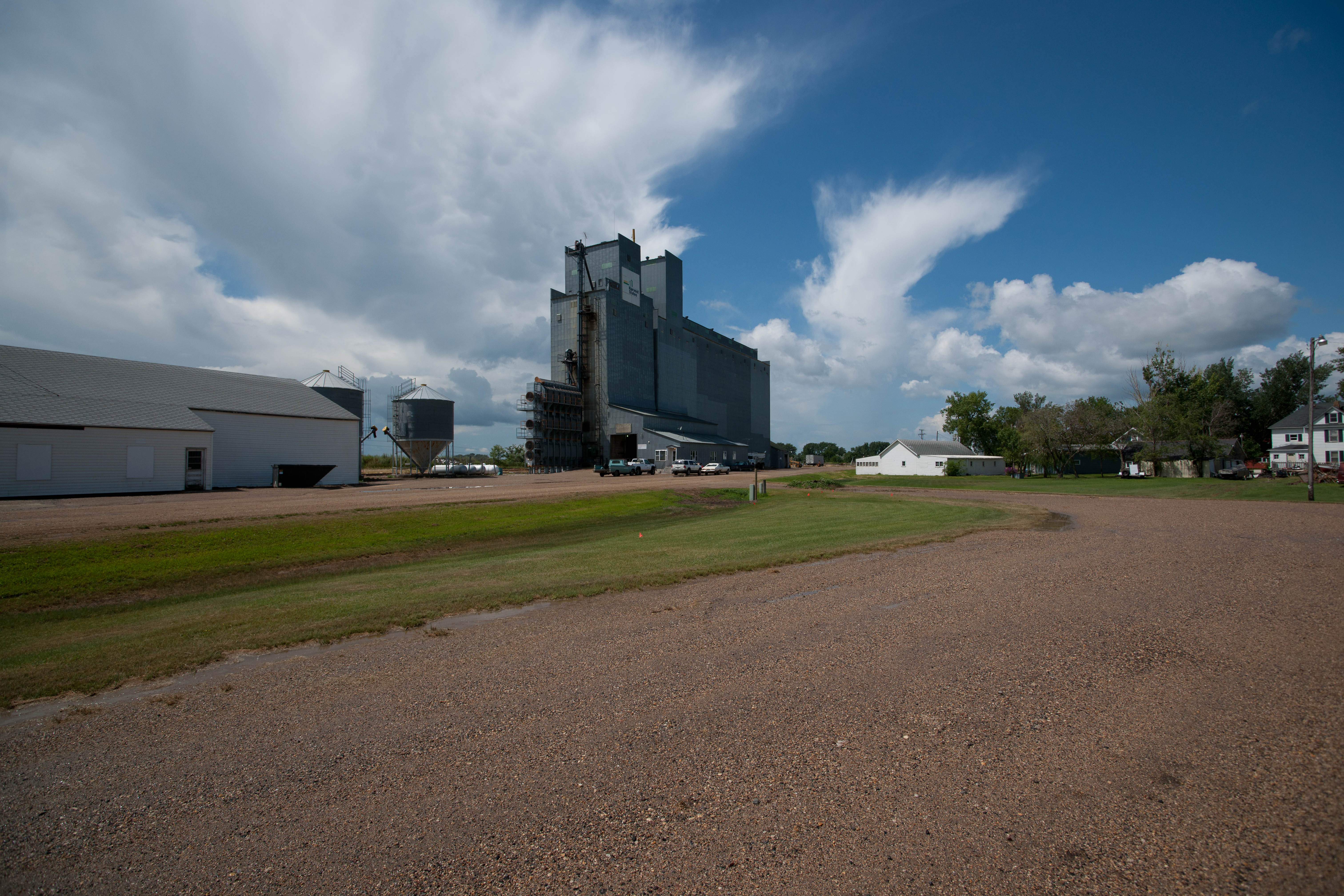 Galchutt, North Dakota.